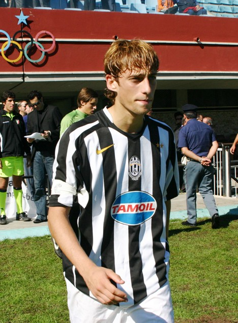 Claudio Marchisio, capitano della Juventus durante la finale della prima edizione del Trofeo Karol Wojtyla giocata allo Stadio Flaminio nel 2005